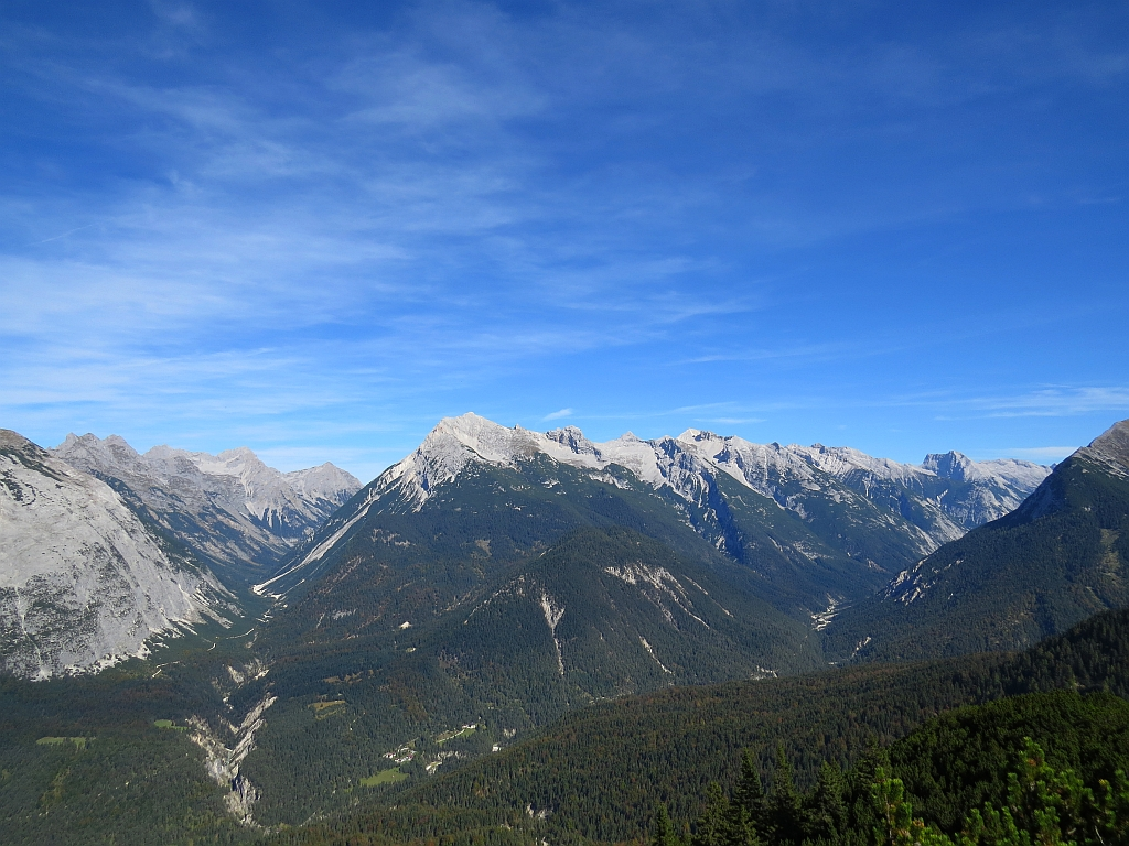 Die Hinterautal-Vomper-Kette ist die längste Gebirgskette im Karwendel